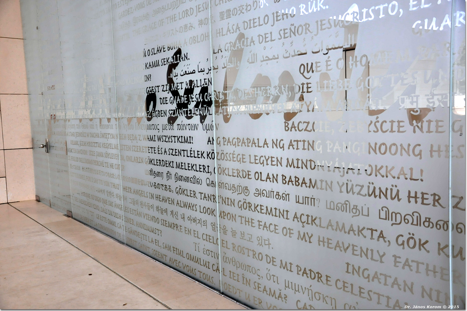 Fatima 0702